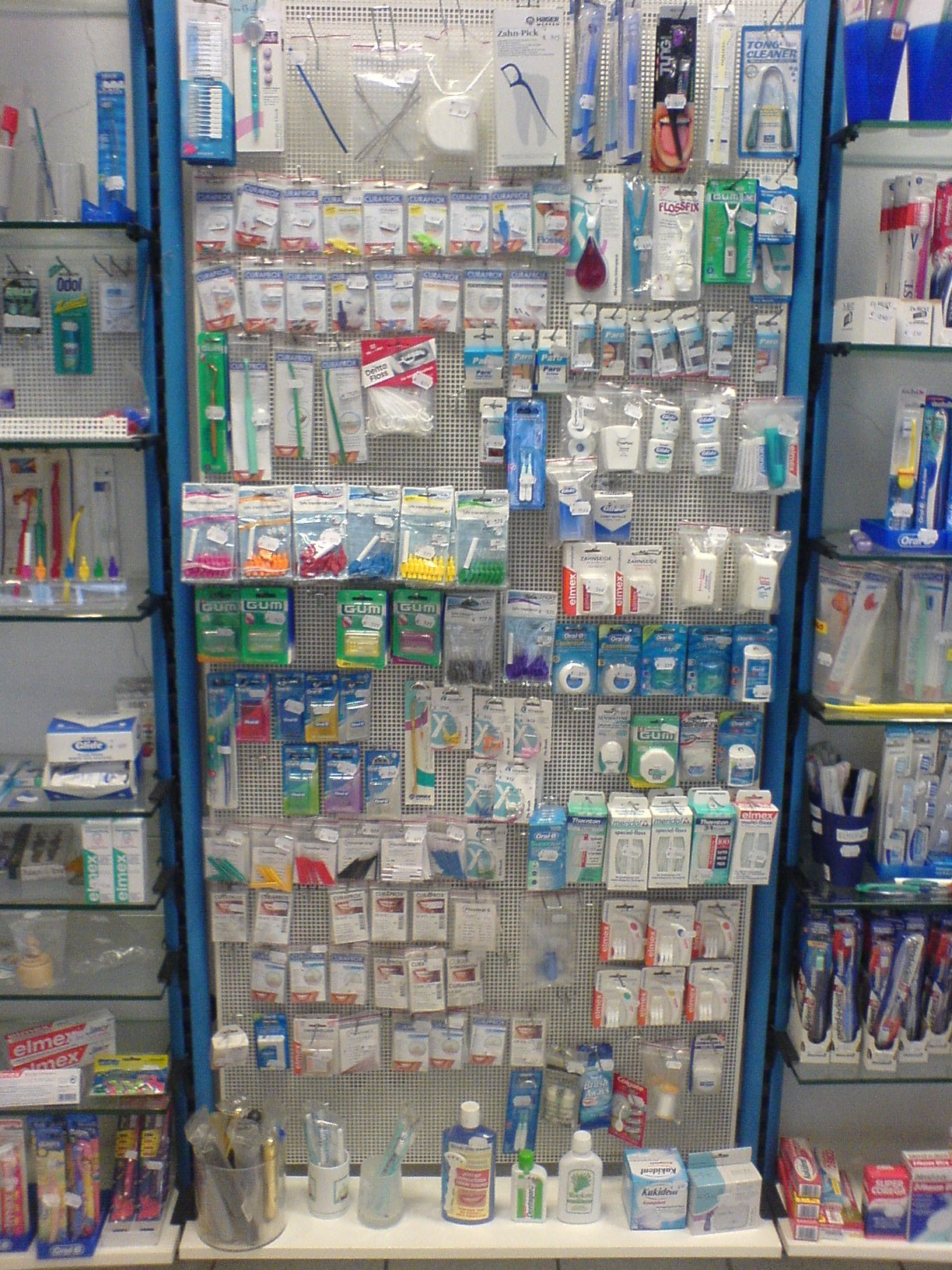 Artikel für die Zahn- und Mundhygiene in einem Einzelhandelsgeschäft.